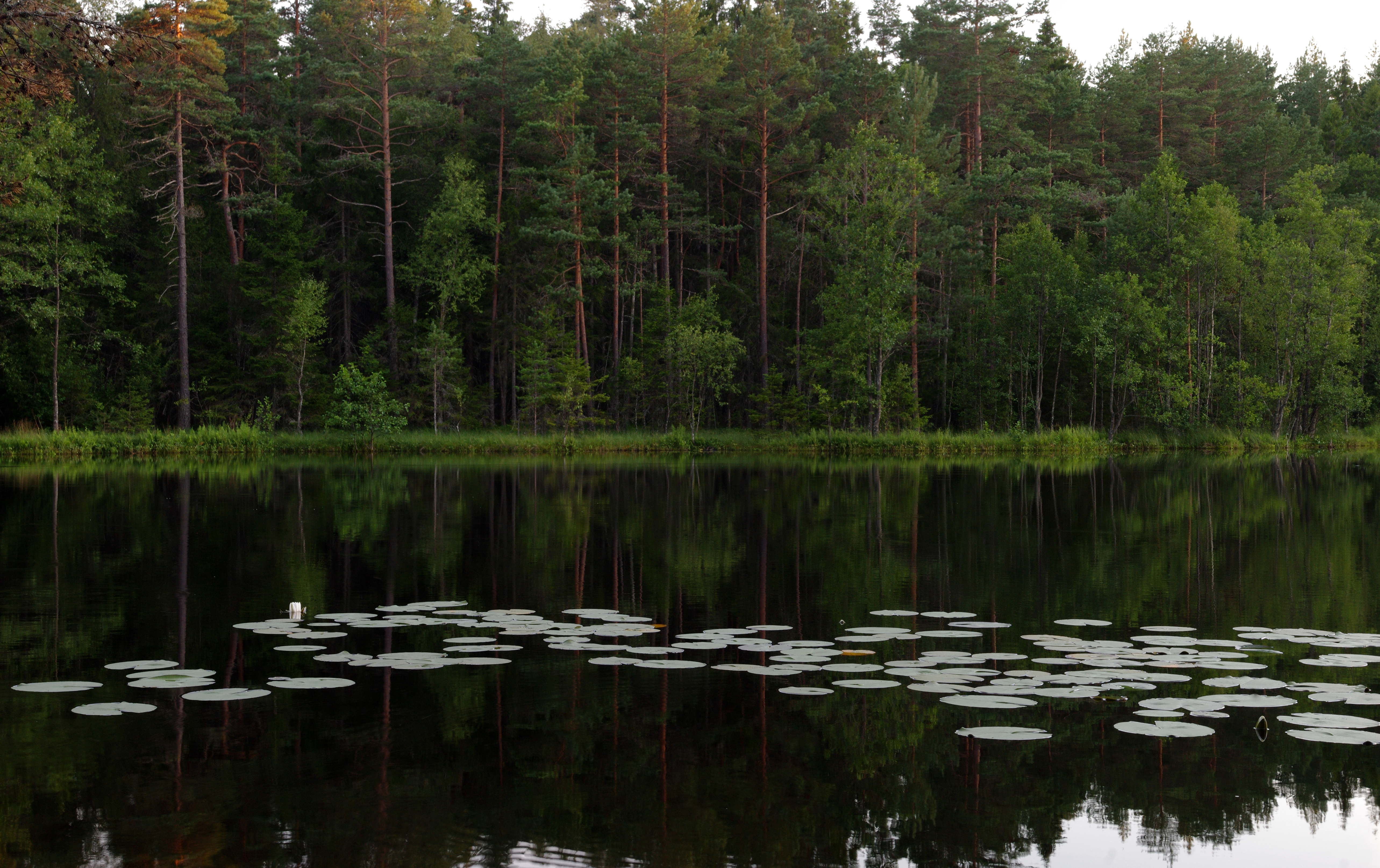 Vesiroosid suur-Kalajärvel